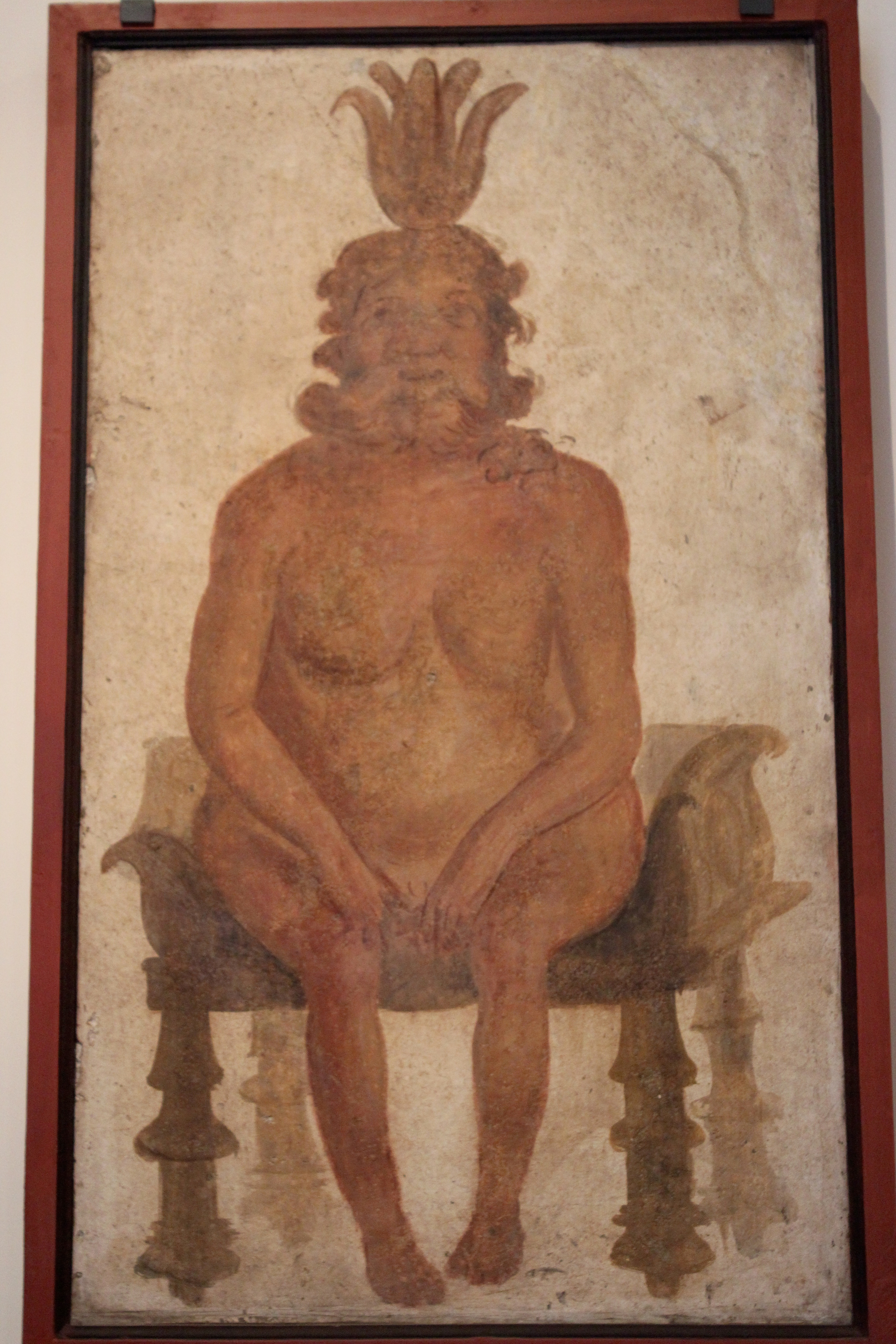 L'affresco rappresentante il dio egiziano Bes seduto su di uno sgabello, rinvenuto nel Sacrarium del Tempio di Iside a Pompei, è esposto nel Museo Archeologico Nazionale di Napoli (inv. 8916) (cat. 1.72). Bes è una divinità egizia agreste e della danza, benevola, allontanatrice degli spiriti maligni, raffigurata come nano goffo e deforme, dalla grossa testa barbata e irsuta, il naso camuso, la lingua penzoloni, e piume di struzzo in testa (qui sostituite con un fiore di loto).